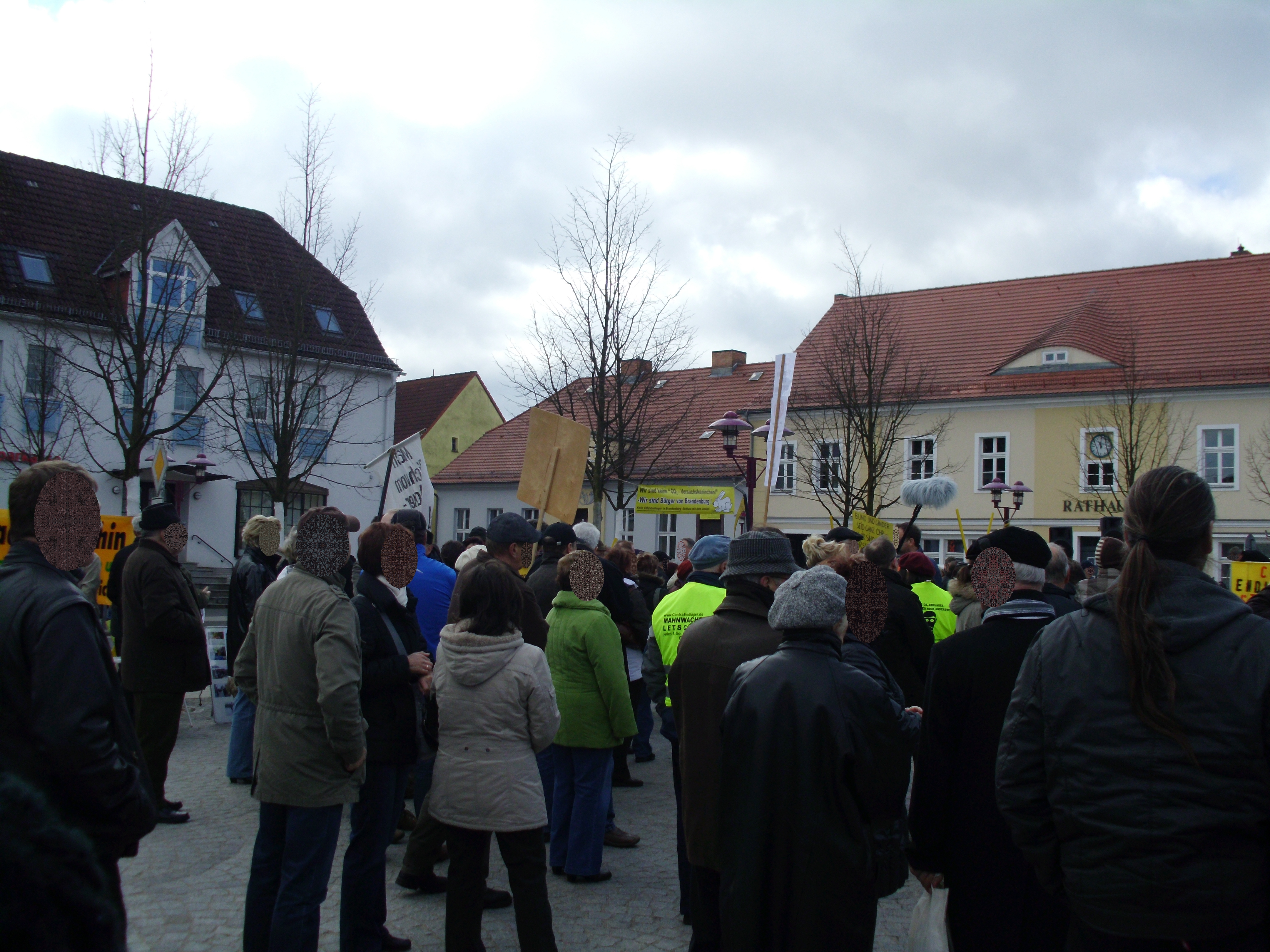 Proteste gegen die CO2-Abscheidung und -Speicherung